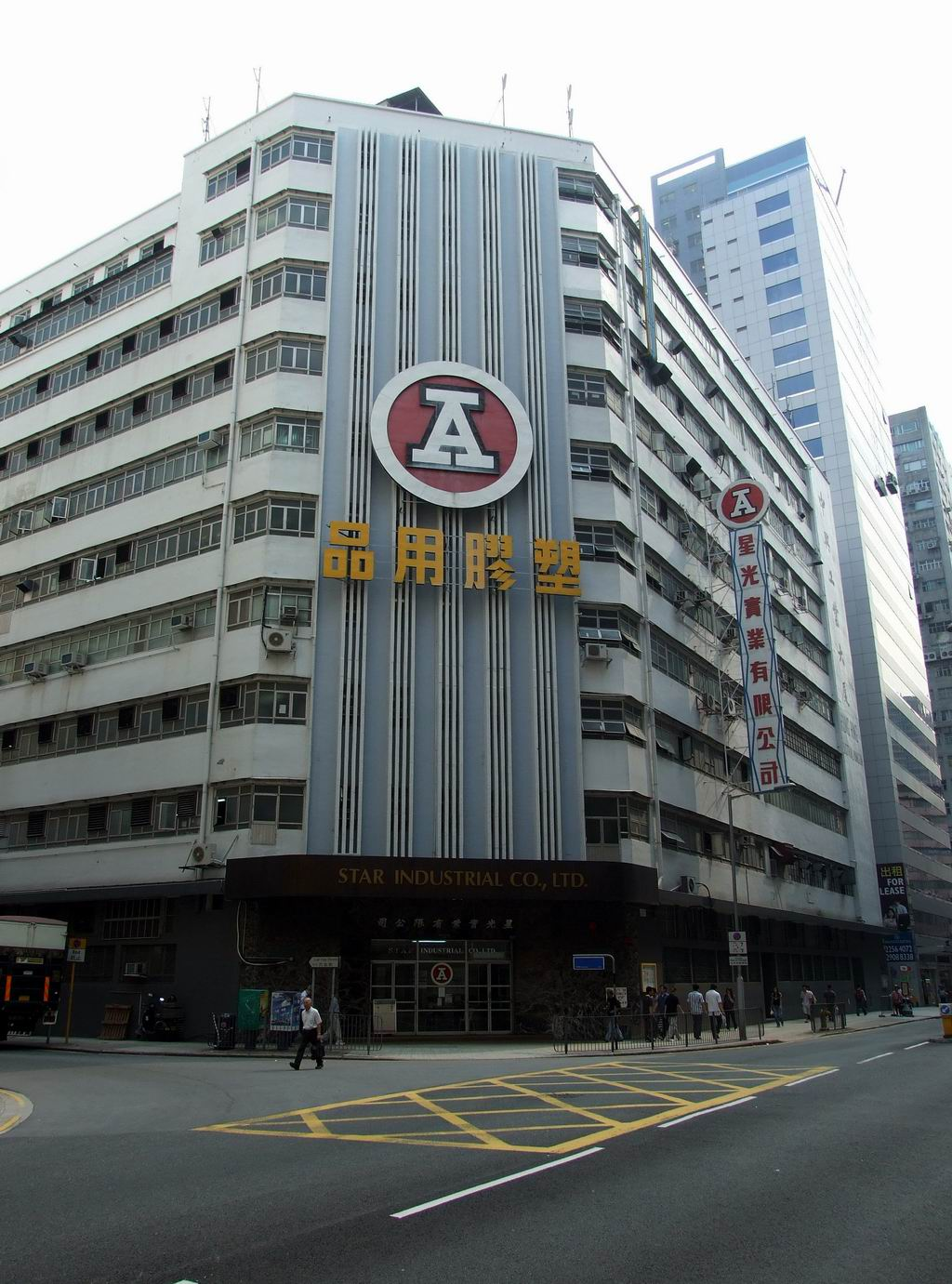 星光實業總寫字樓